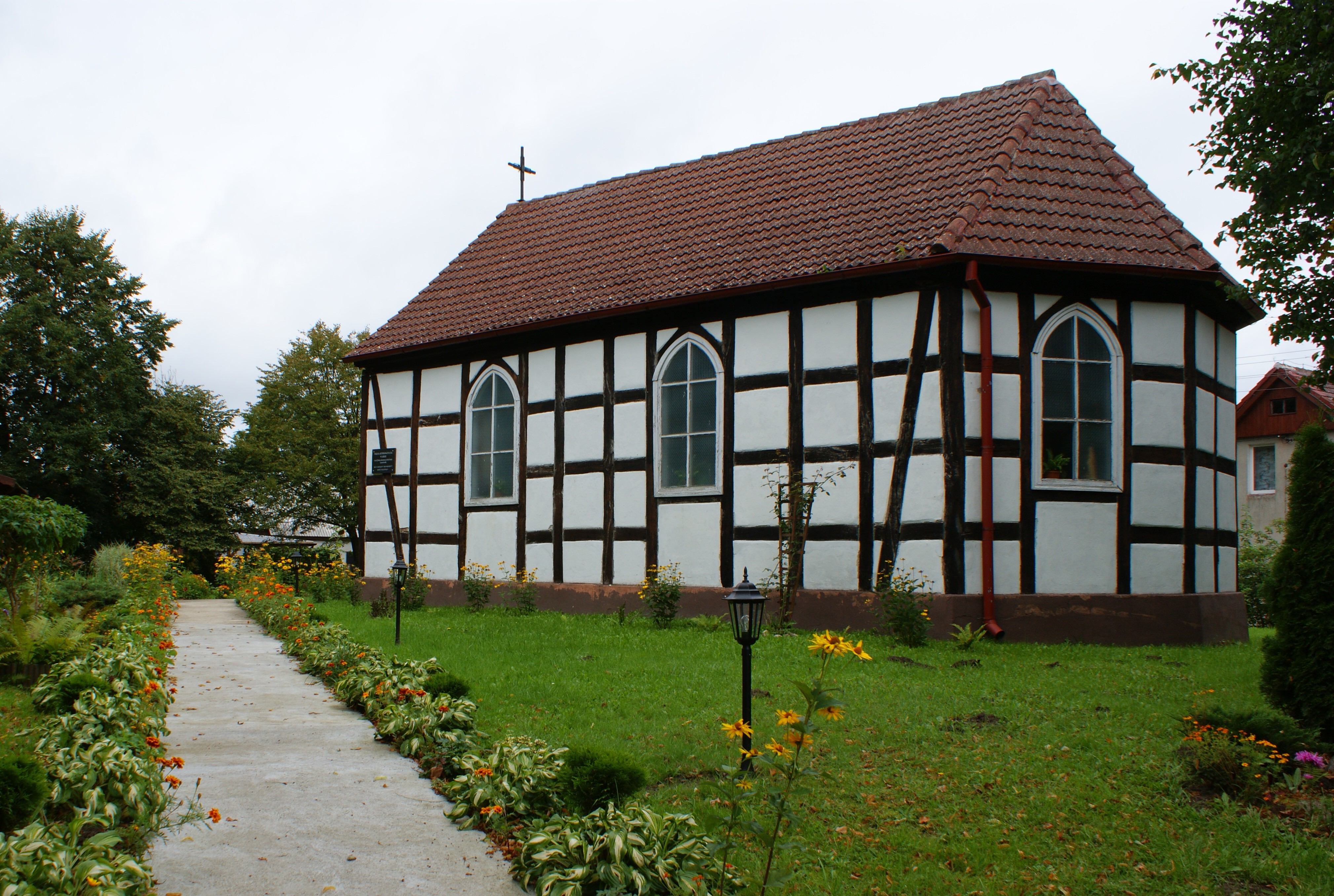 Kościół MB Częstochowskiej w Karwowie (zabytek nr rejstr. 338)